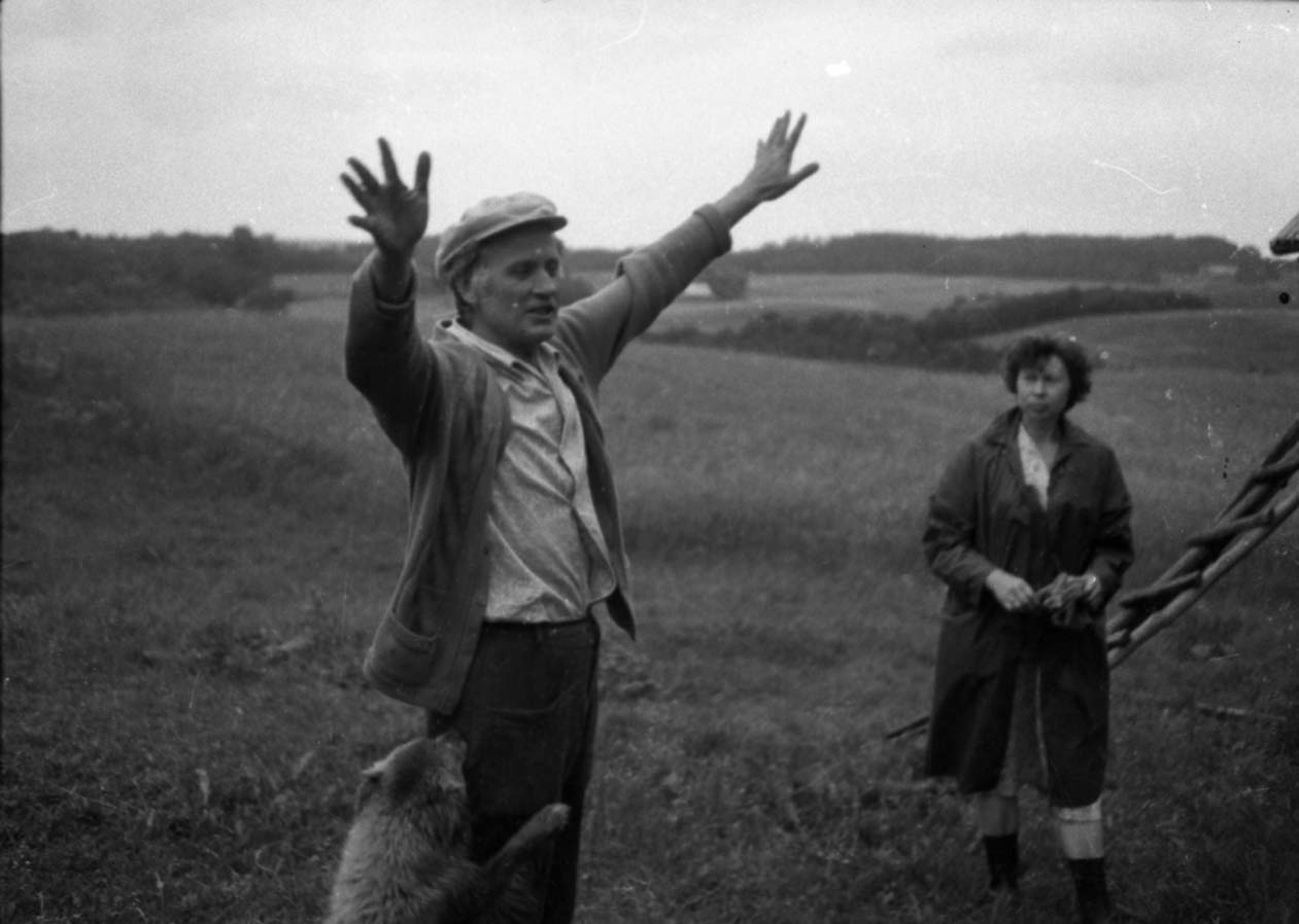 Alfonsas Danys su žmona Birute Daniene